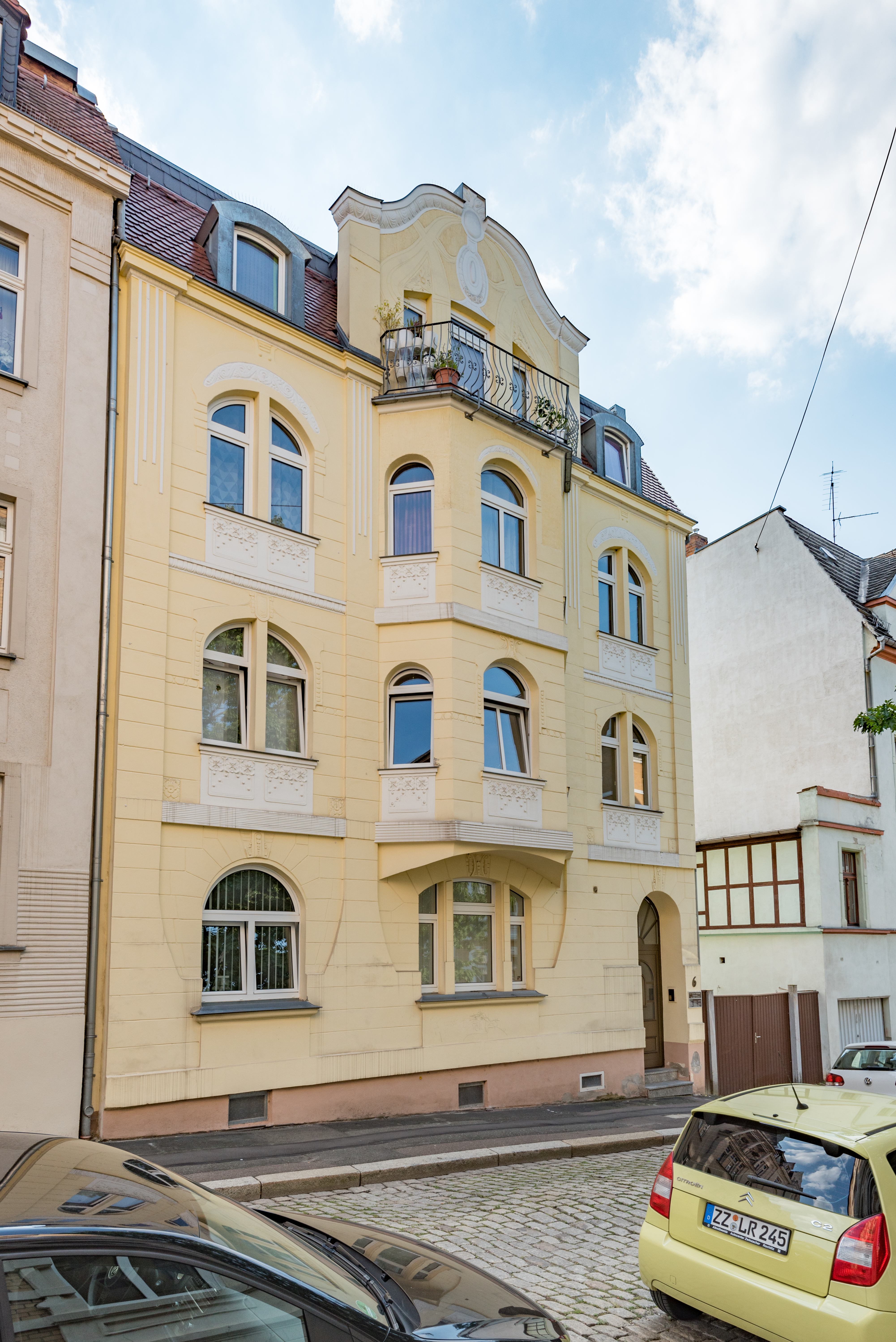 Zeitz, Einsteinstraße 6